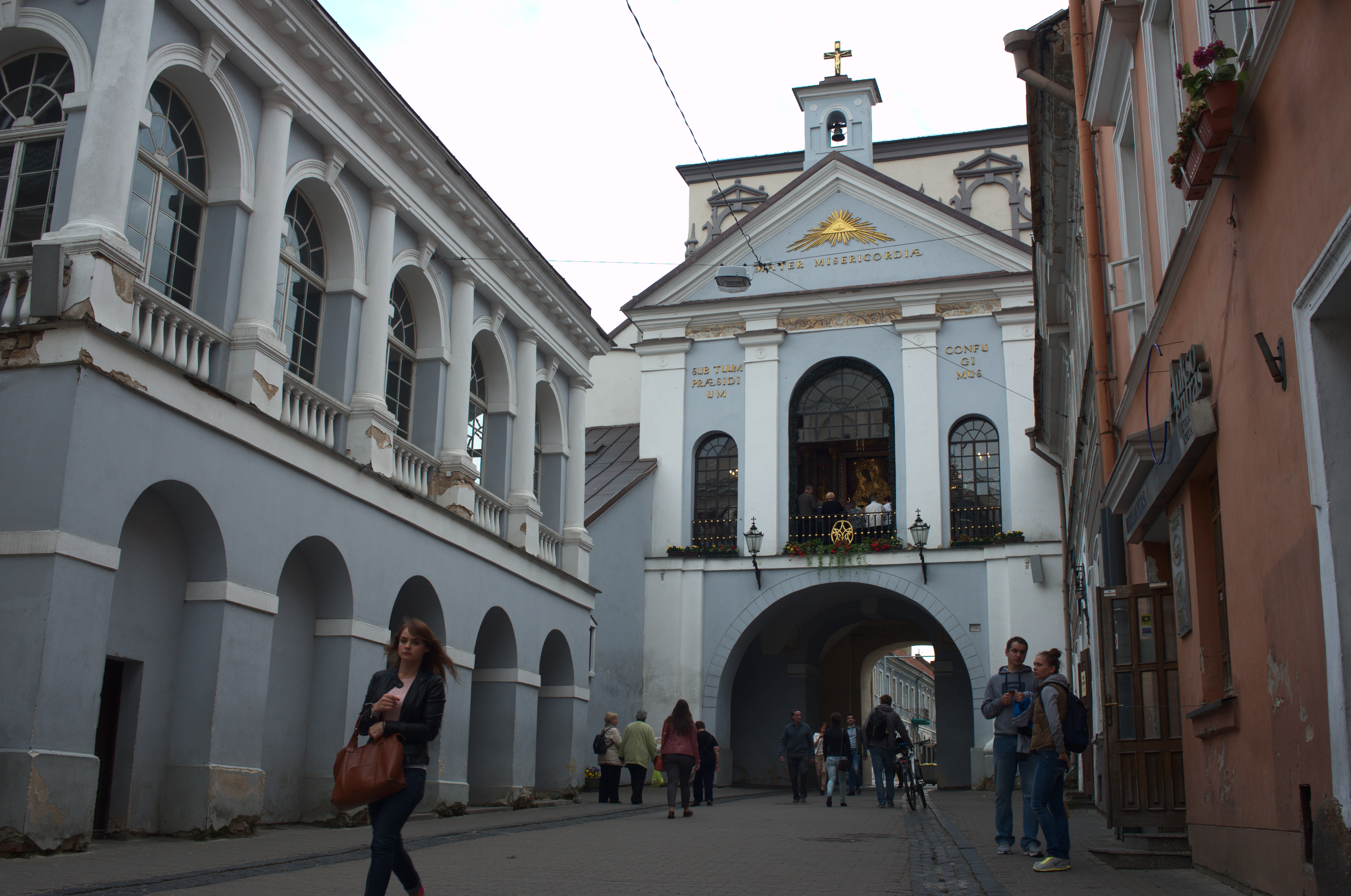 Virgin Mary of Vilnius, Lithuania. Photo by Milan Fujda.